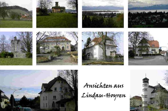 Bildinhalt: Postkartenmotiv Lindau-Hoyren obere Zeile: Ausblicke vom Hoyerberg Blick in Richtung Ringoldsberg und Schönau Hoyerberg- bzw. Gruber-Schlössle, Blickrichtung über den Wasserspeicher Lindau-Insel, Bodensee mit österreichischen Alpen (Malerblickwinkel) Turm des Schachen-Schlössle, Bodensee mit Schweizer Alpen mittlere Zeile: Gebäude (1) Standbild "Adler" mit Bismark-Relief Schulgebäude Hoyren ehem. Rathaus und Lehrerhaus, heute Kindergarten Dorfbrunnen und ehem. Gasthaus Sonne untere Zeile: Gebäude (2) Blick über die Schönauer Str. in südlicher Richtung mit Hausnr. 5 (Bj. 1908, Julius Haug) histor. Teil des Feuerhaus mit Schlauchturm der Feuerwache West